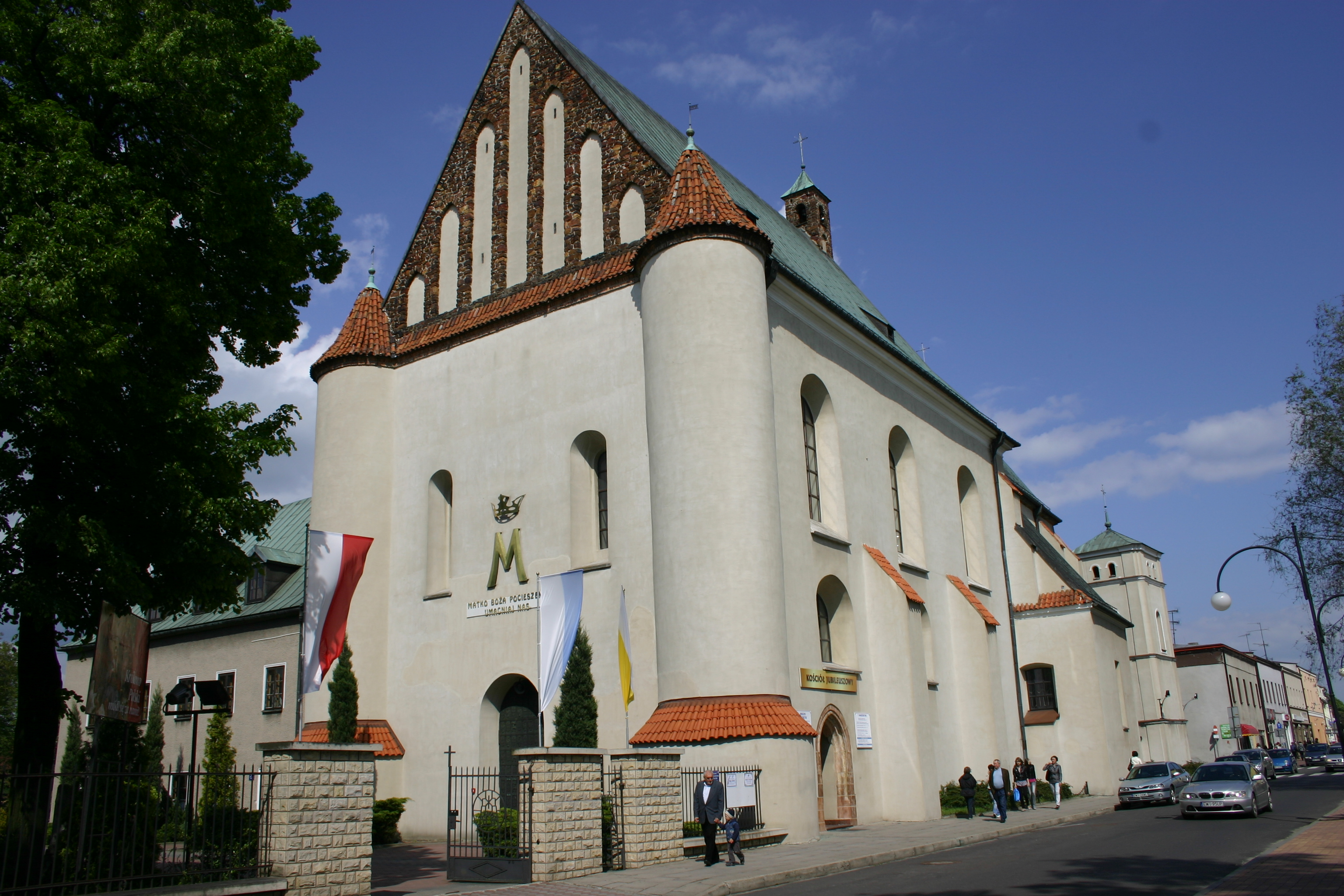 Wieluń - kościół kolegiacki p.w. Bożego Ciała, w zespole klasztornym augustianów, mur., XIV, XVII